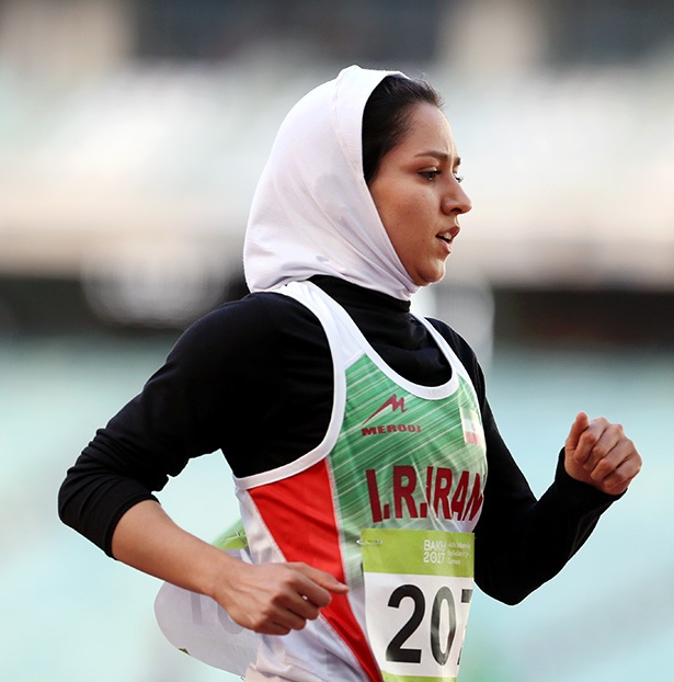 فرناز فصیحی در مسابقات دومیدانی بازی‌های کشورهای اسلامی۲۰۱۷/باکو